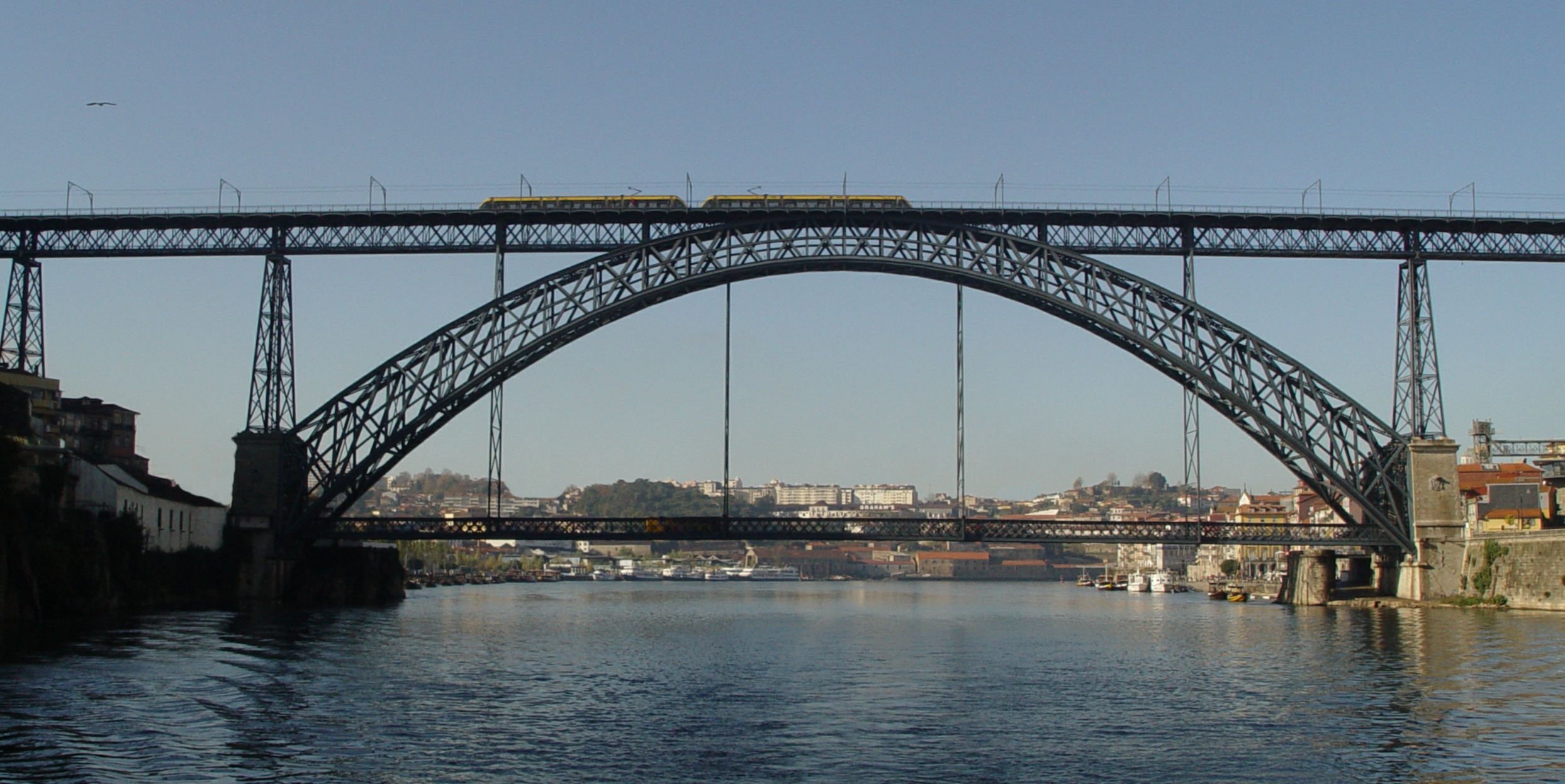 D. Luis Bridge in Porto Portugal